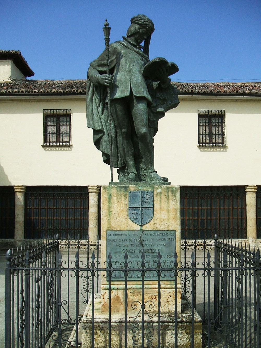 Monumento al poeta Diego Gómez Manrique, junto al Real Monasterio de Nuestra Señora de la Consolación (MM Clarisas Franciscanas), Calabazanos, Palencia, Castilla y León, España